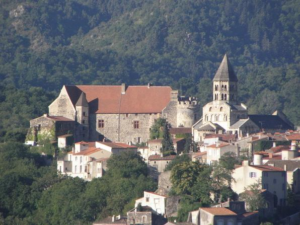 Village de Saint-Saturnin (63)